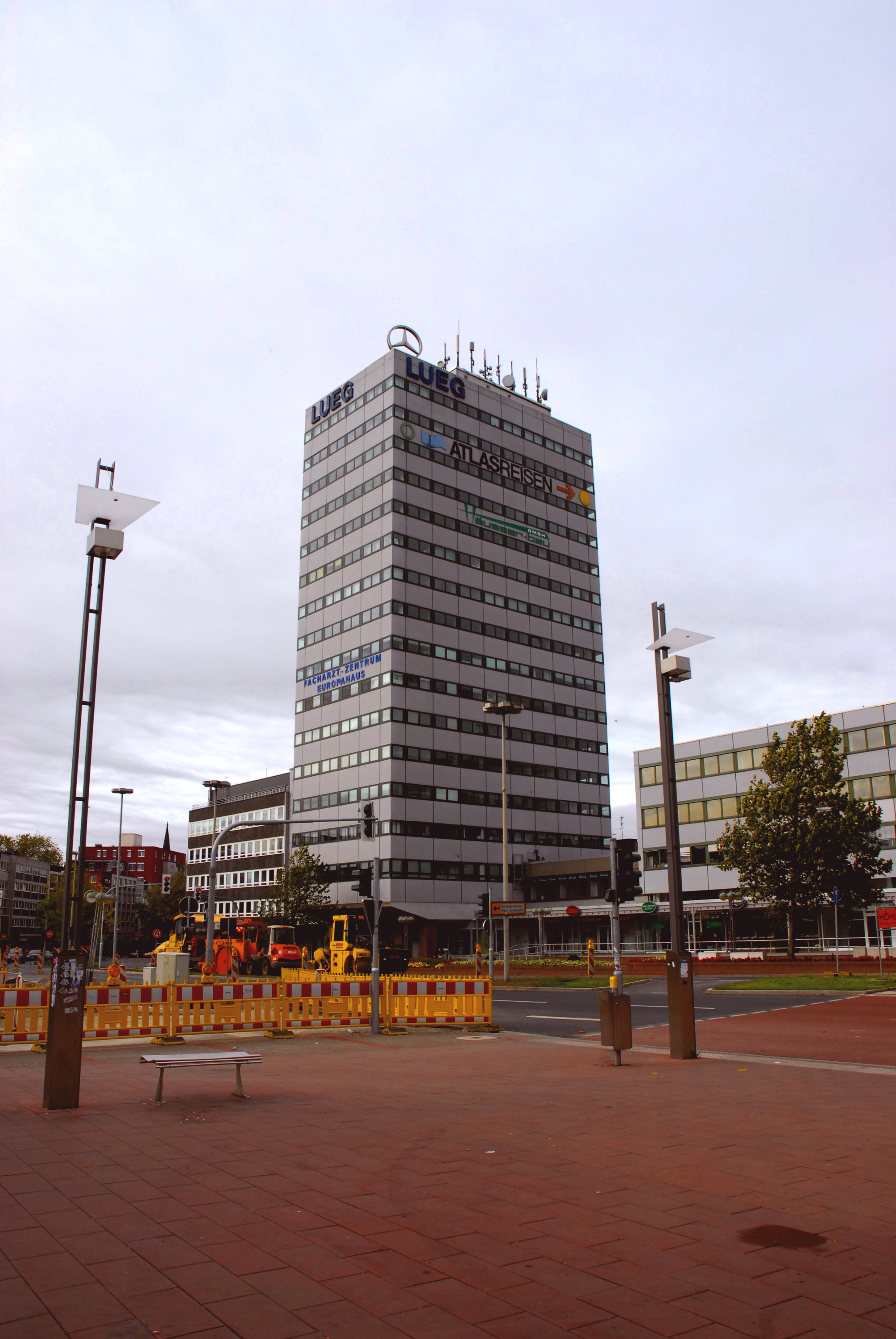 Europahaus in Bochum vom Hbf aus fotografiert